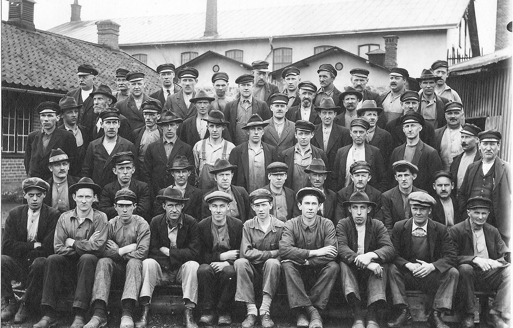 Stensholms fabriks personal 1930.